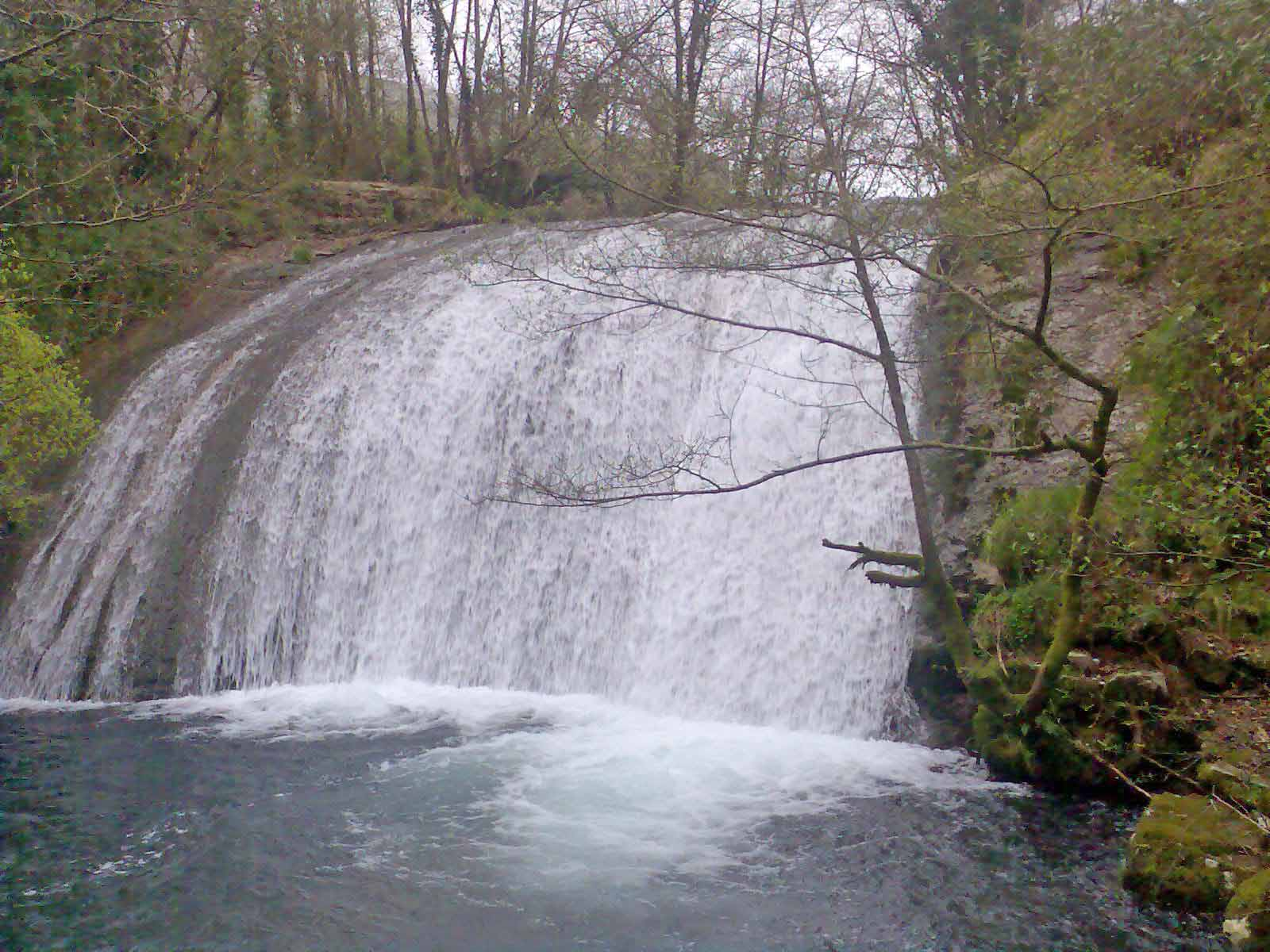 Fervenza en Toxosoutos